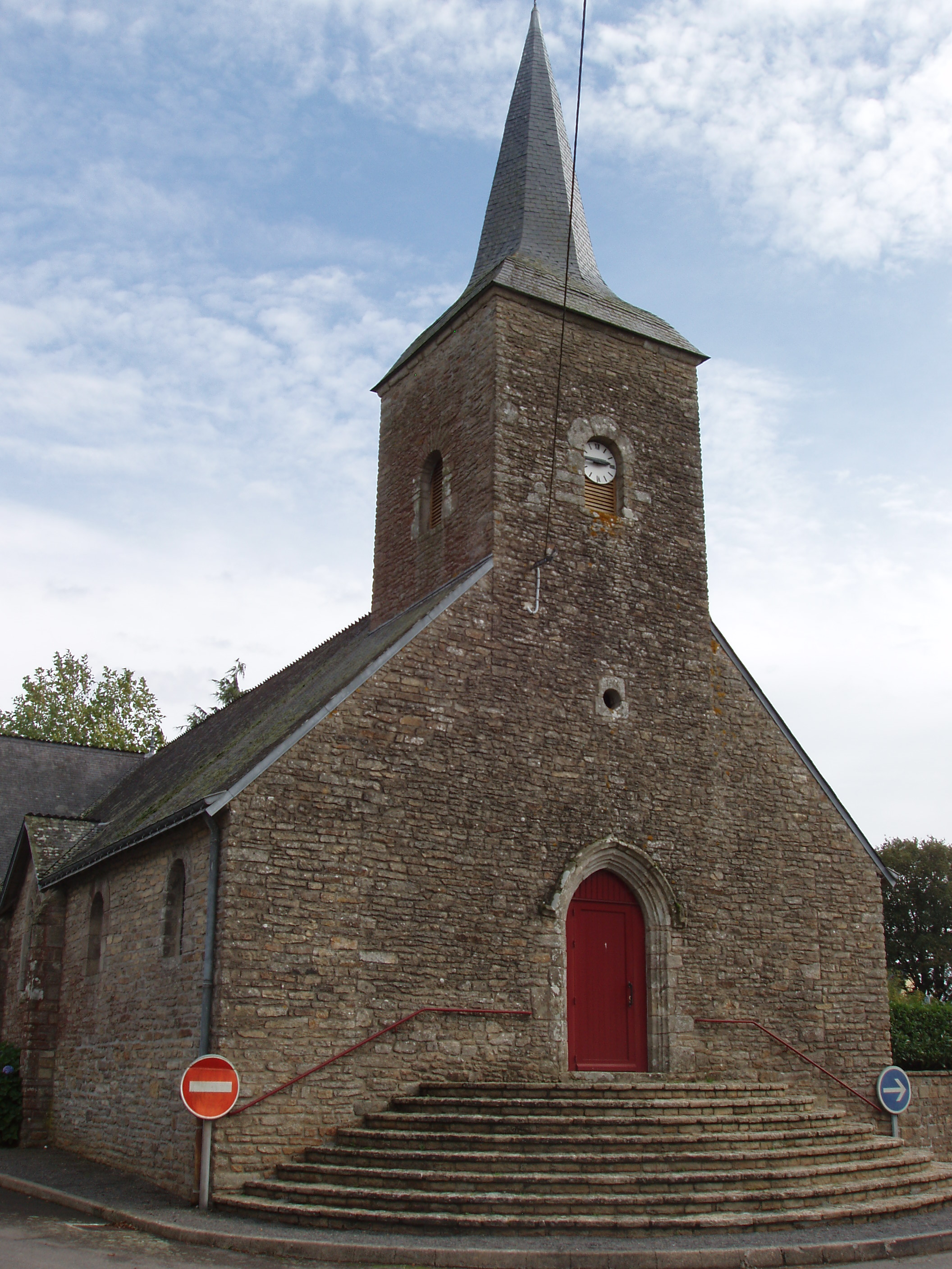 église de la commune de Saint-Gorgon (Morbihan)